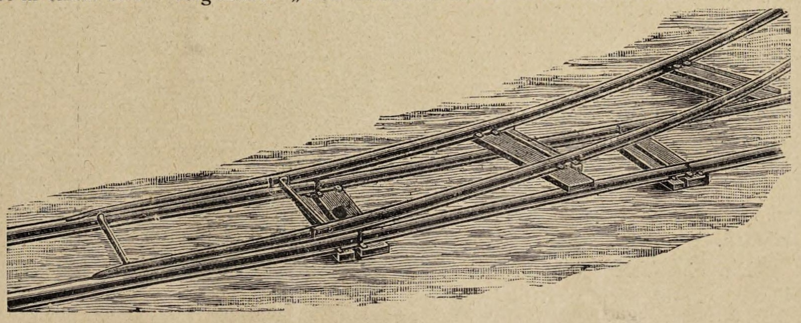 Obstplantage Wilhelm de Joncheere, Cleve am Niederrhein